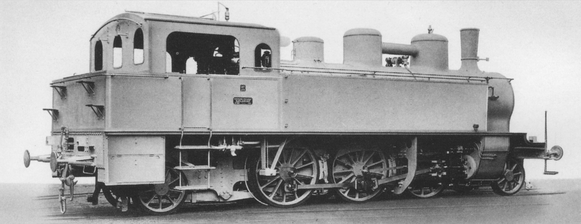 Dampflokomotive Badische VI b.